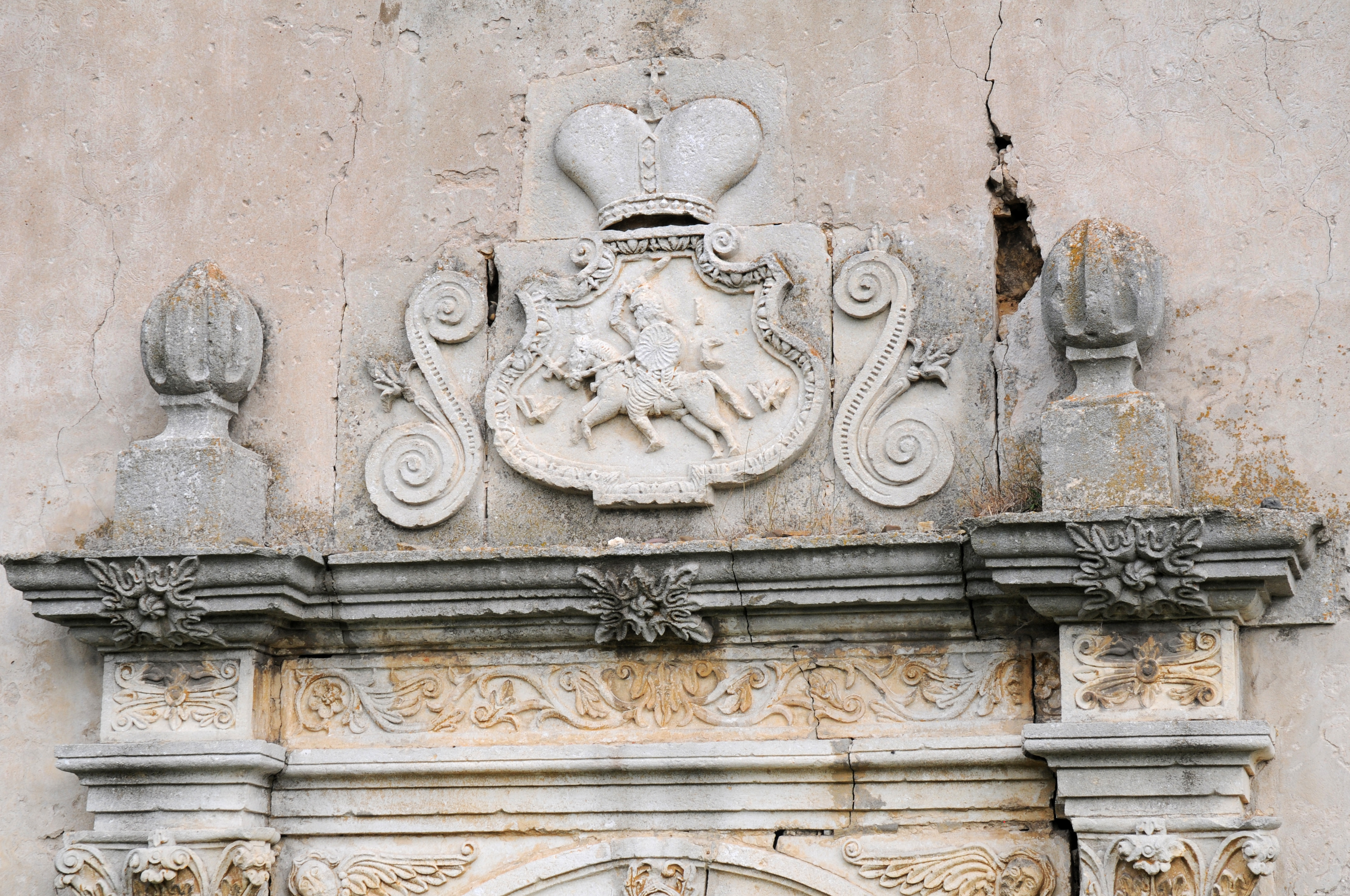 Чернелиця, домініканський костел